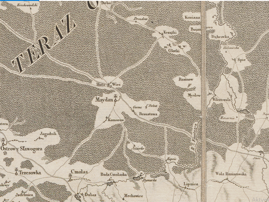 Okolice Brzostowej Góry na mapie Województwa Sandomierskiego z roku 1791. Widoczny podział miejscowości na "Górną" i "Dolną"